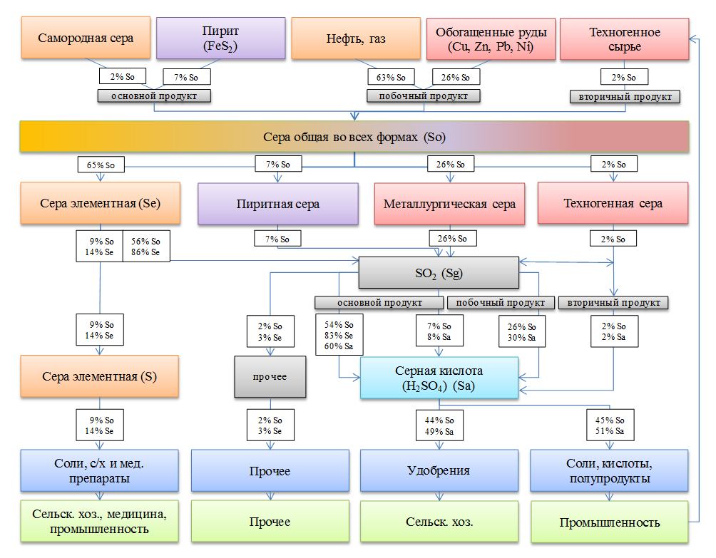 Схематическая структура мирового производства-потребления серы и серной кислоты